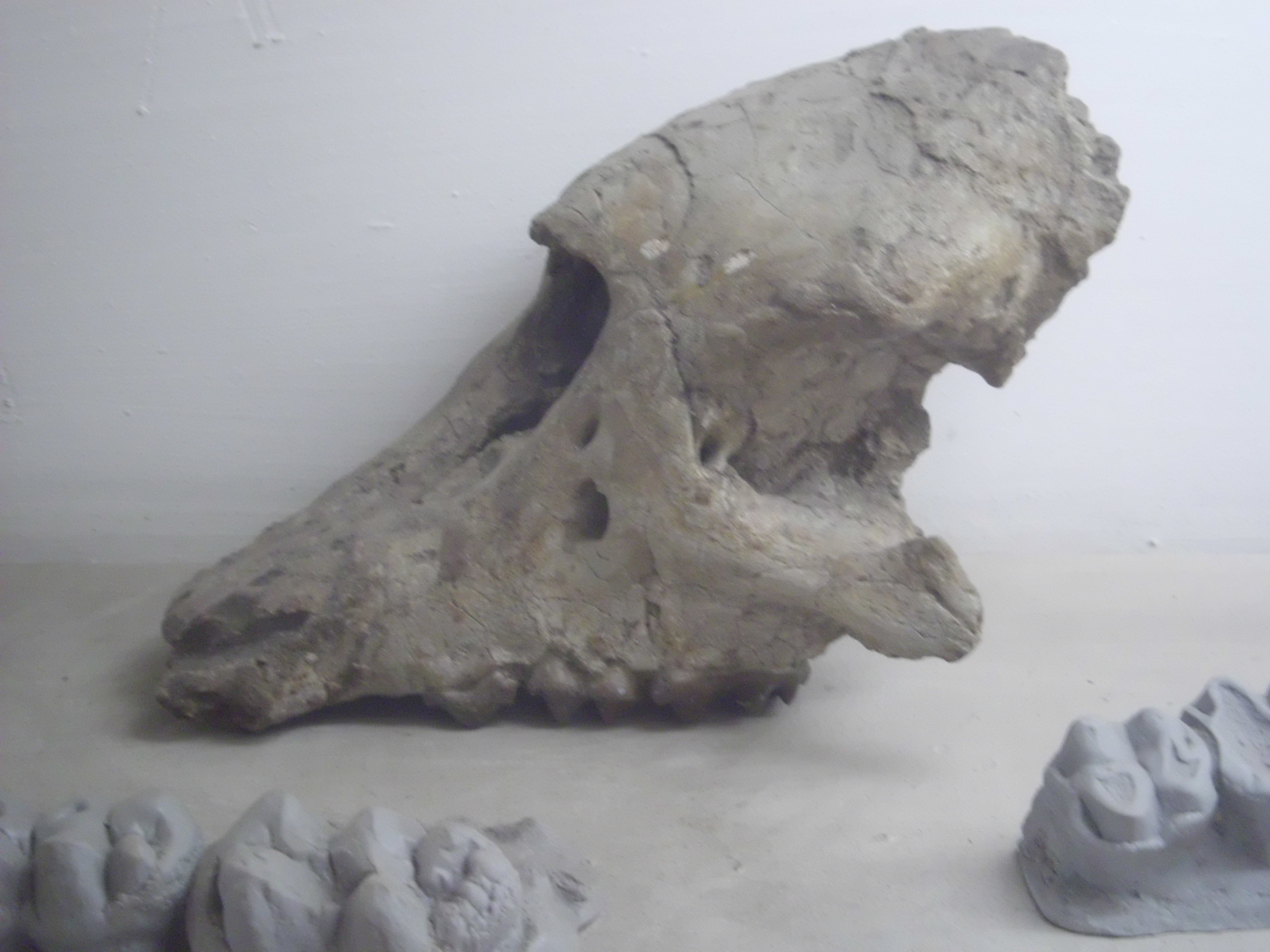 الجزء الامامي من الفك السفلي لحيوان فيوميا وهو من اسلاف الفيل الحالي